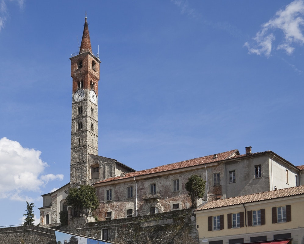 La chiesa romanica è stata edificata verso la fine del sec. XI. A forma basilicale, col tempo ha subito molte modifiche. Interessante il campanile, originariamente torre in pietra del Castello Pietrasanta, costruito per difendere il colle più altro del borgo di Canturio.